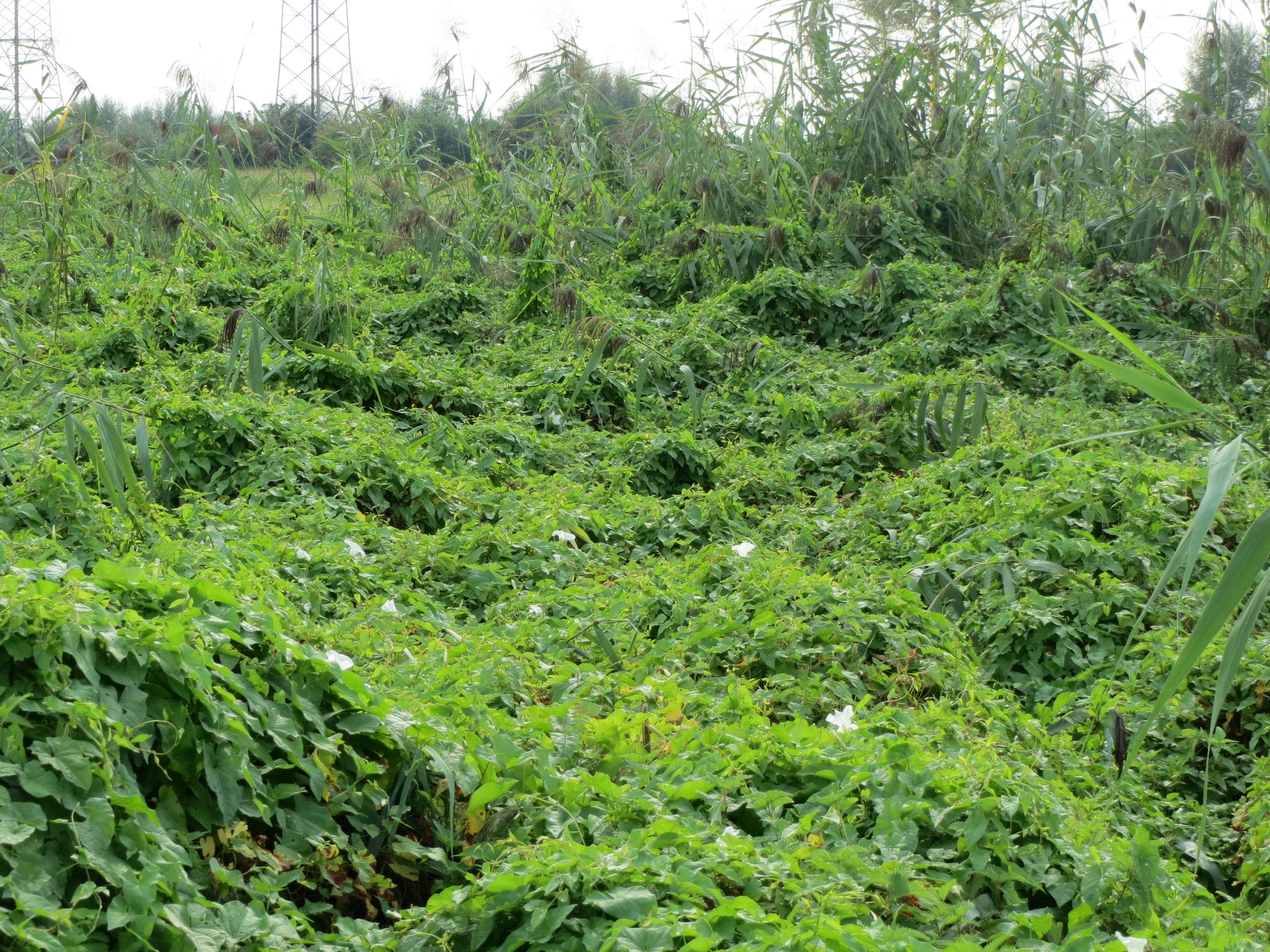 Zaunwinde (Calystegia sepium) im Hockenheimer Rheinbogen